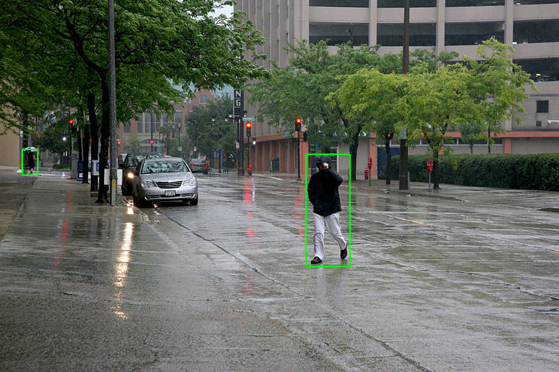 Pedestrian detection example